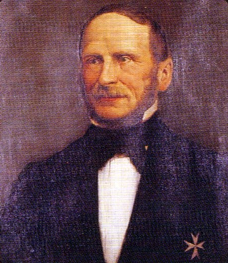 Oberbürgermeister von Münster Johann Heinrich von Olfers, Lithographie nach einer Photographie von August Dirks (Original im Westfälischen Landesmuseum Münster)